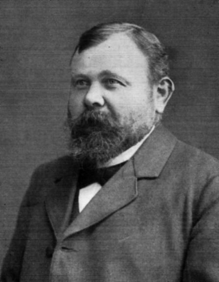 Otto Oellerich (1862–1921), homme politique (SPD) et syndicaliste allemand